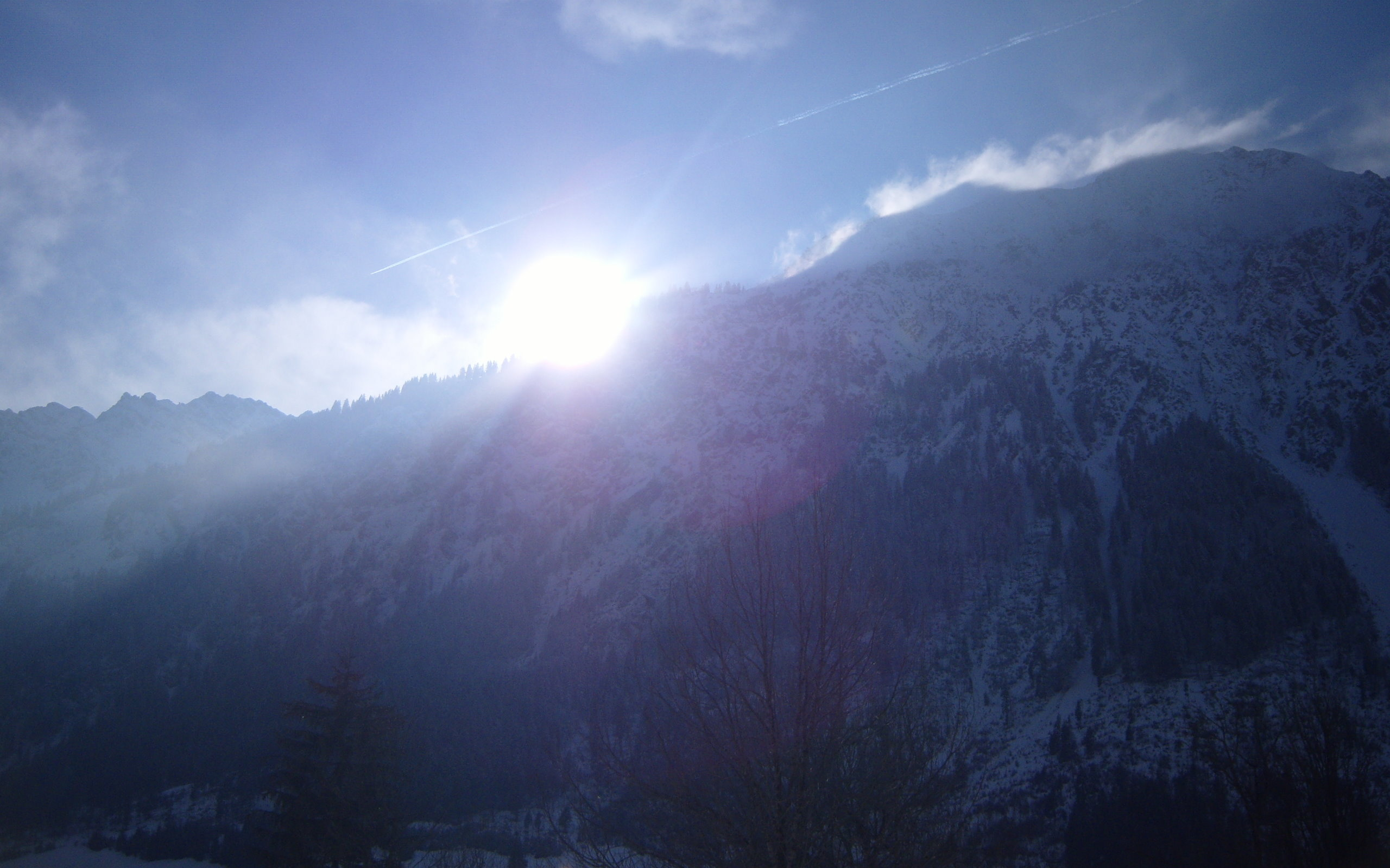 Sonnenuntergang am Breitenberg